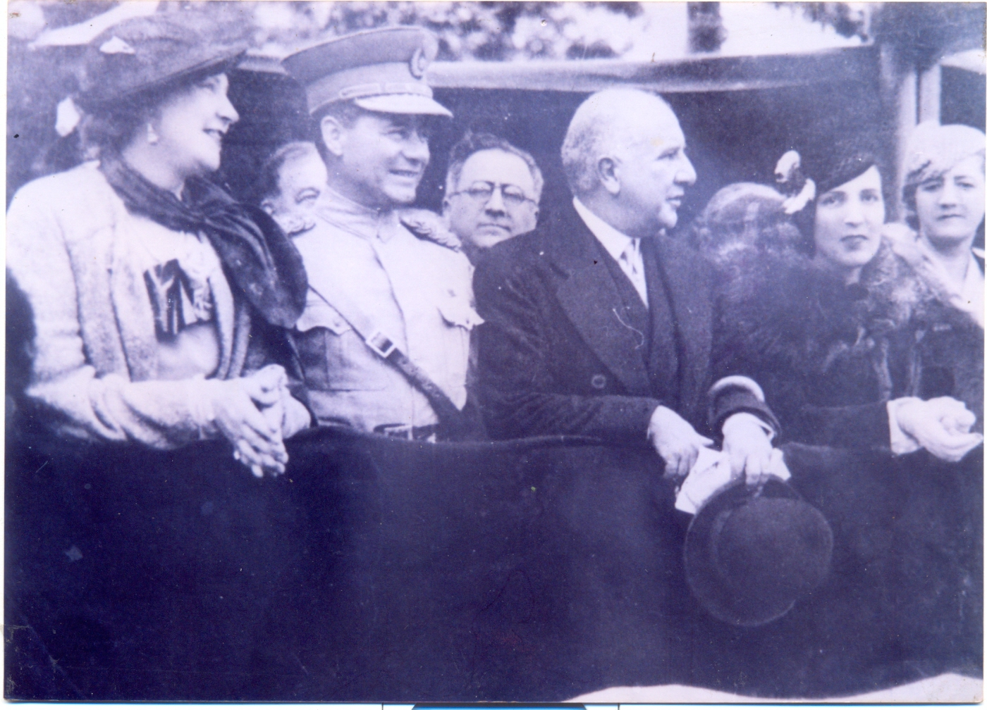 Palco oficial del desfile de la victoria con Estigarribia